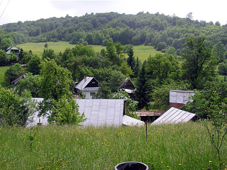 Celkový pohľad